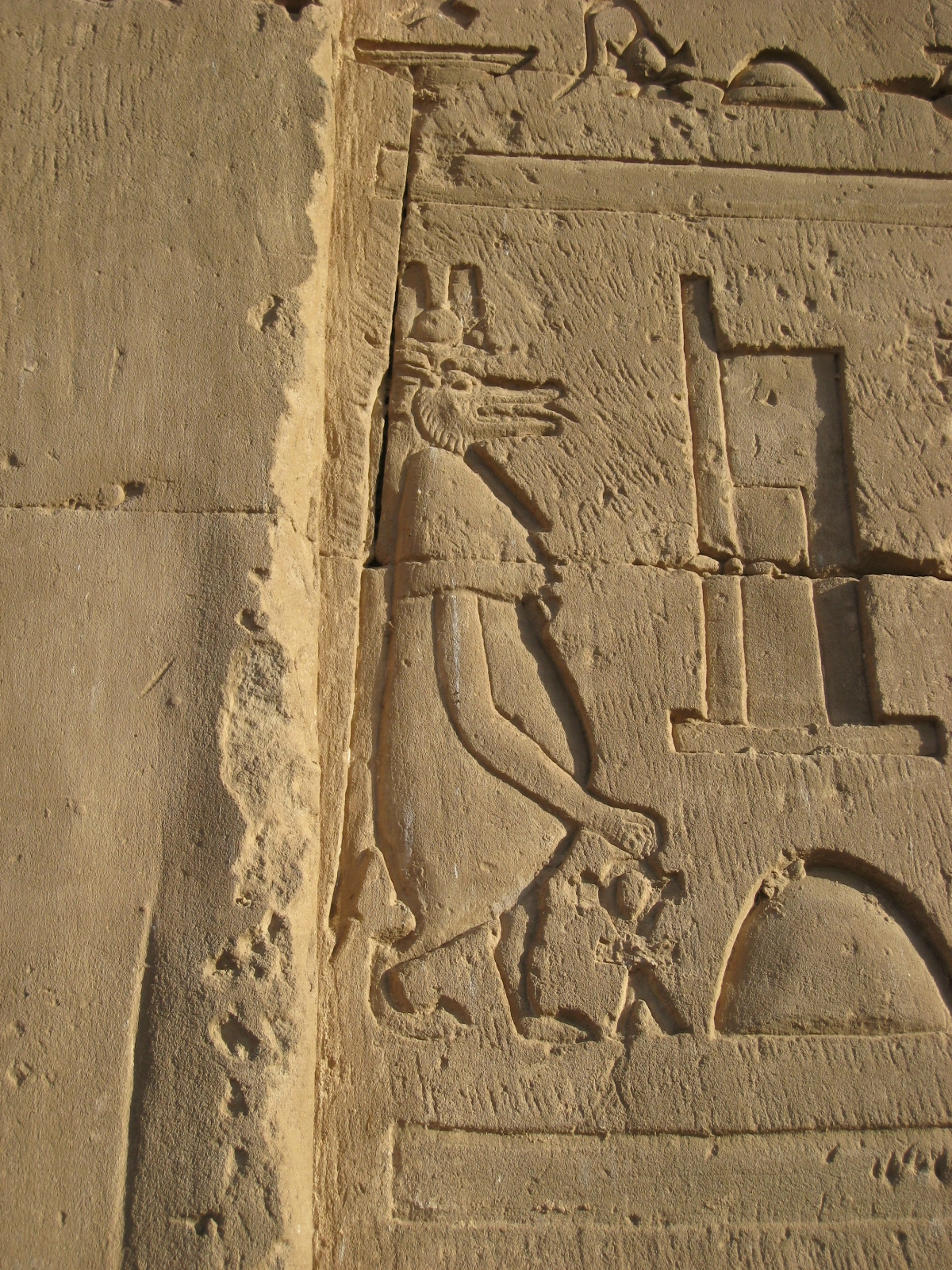 Taweret!